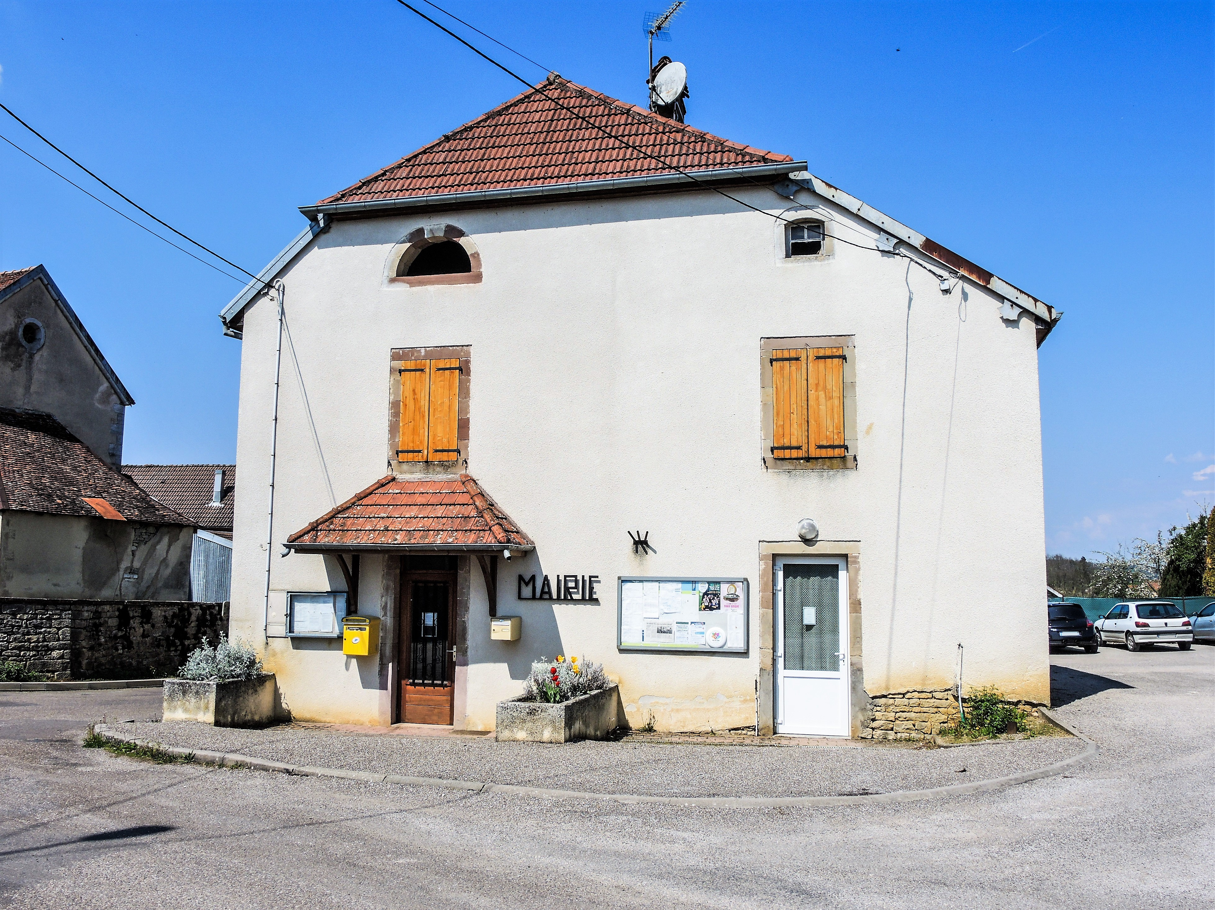 Mairie